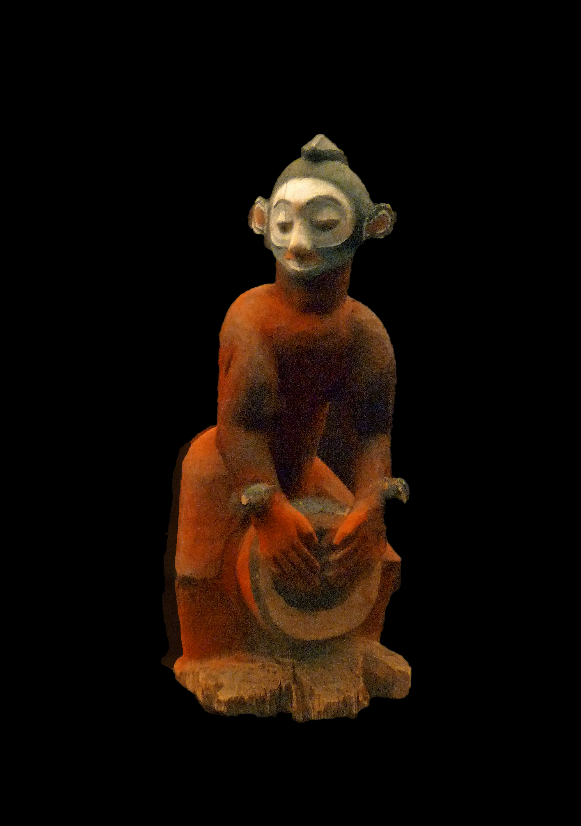 Tambourinaire Nkanu au Musée royal de l'Afrique centrale